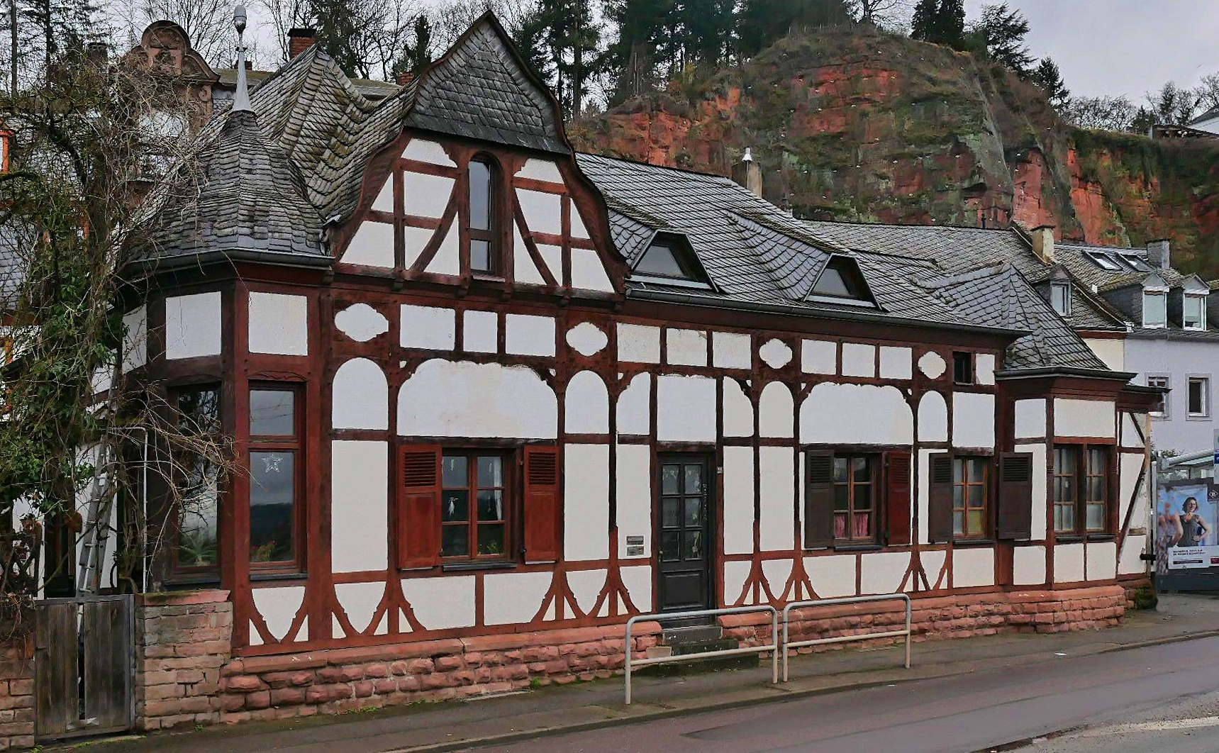 Ehemalige Wartehalle der Endstation der 1905 eröffneten Straßenbahnlinie nach Pallien; malerischer eingeschossiger Fachwerkbau.